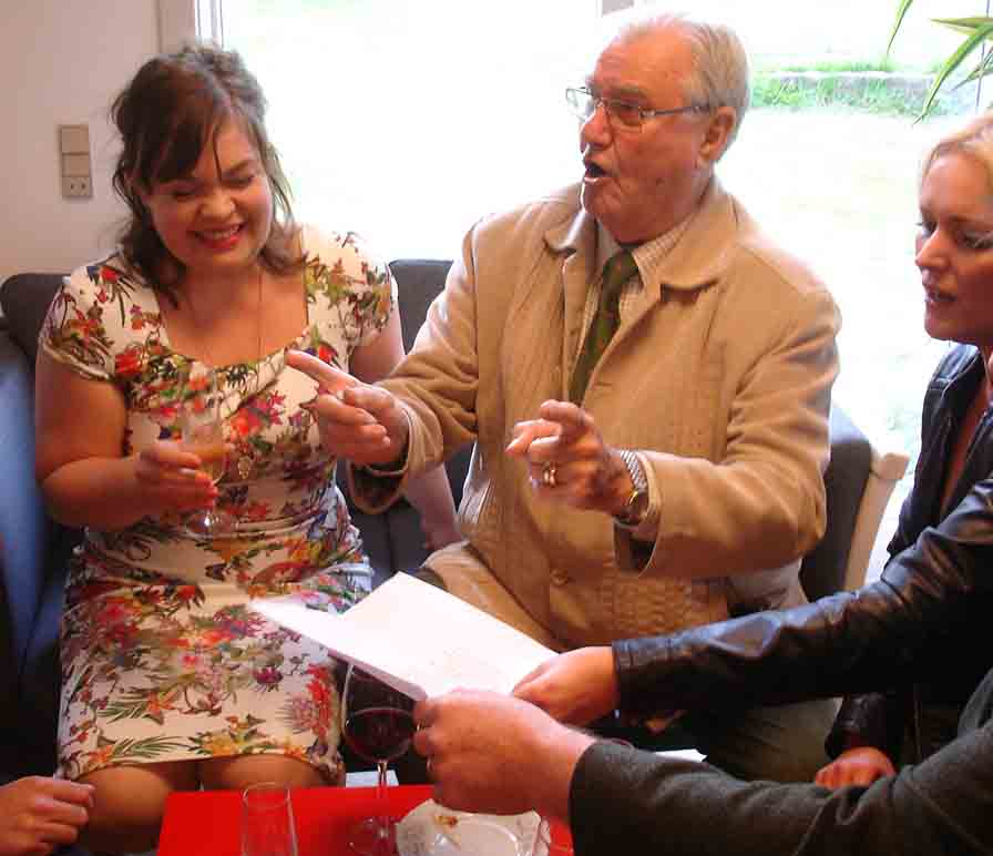 Prinsgemalen dirigerer operasangerinderne Ingeborg Børch og Dorthe Elsebet efter æreskunstnerkoncerten i Østermarie 2015